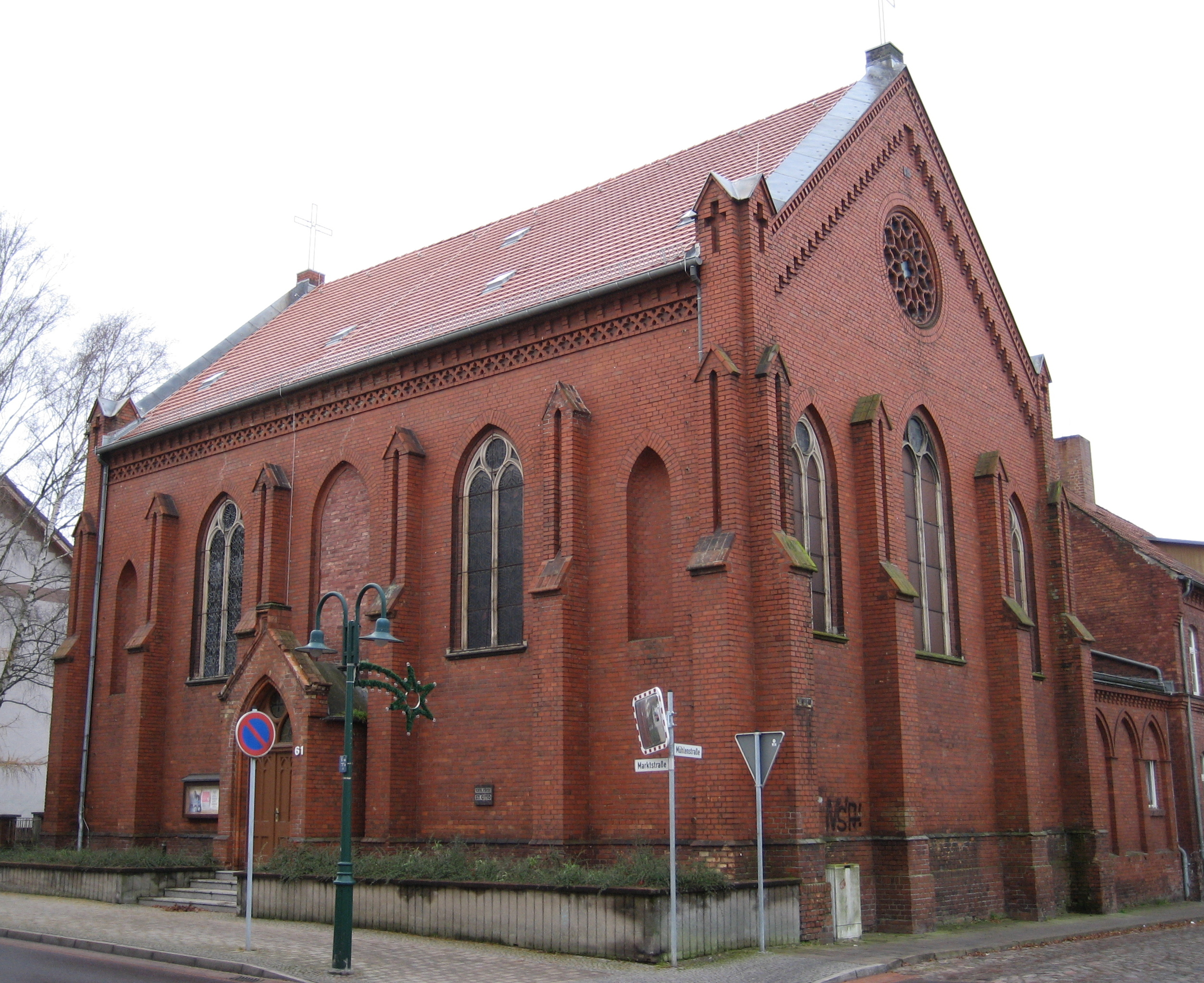 Die St.-Otto-Kirche Pasewalk aus Blickrichtung Nordosten.